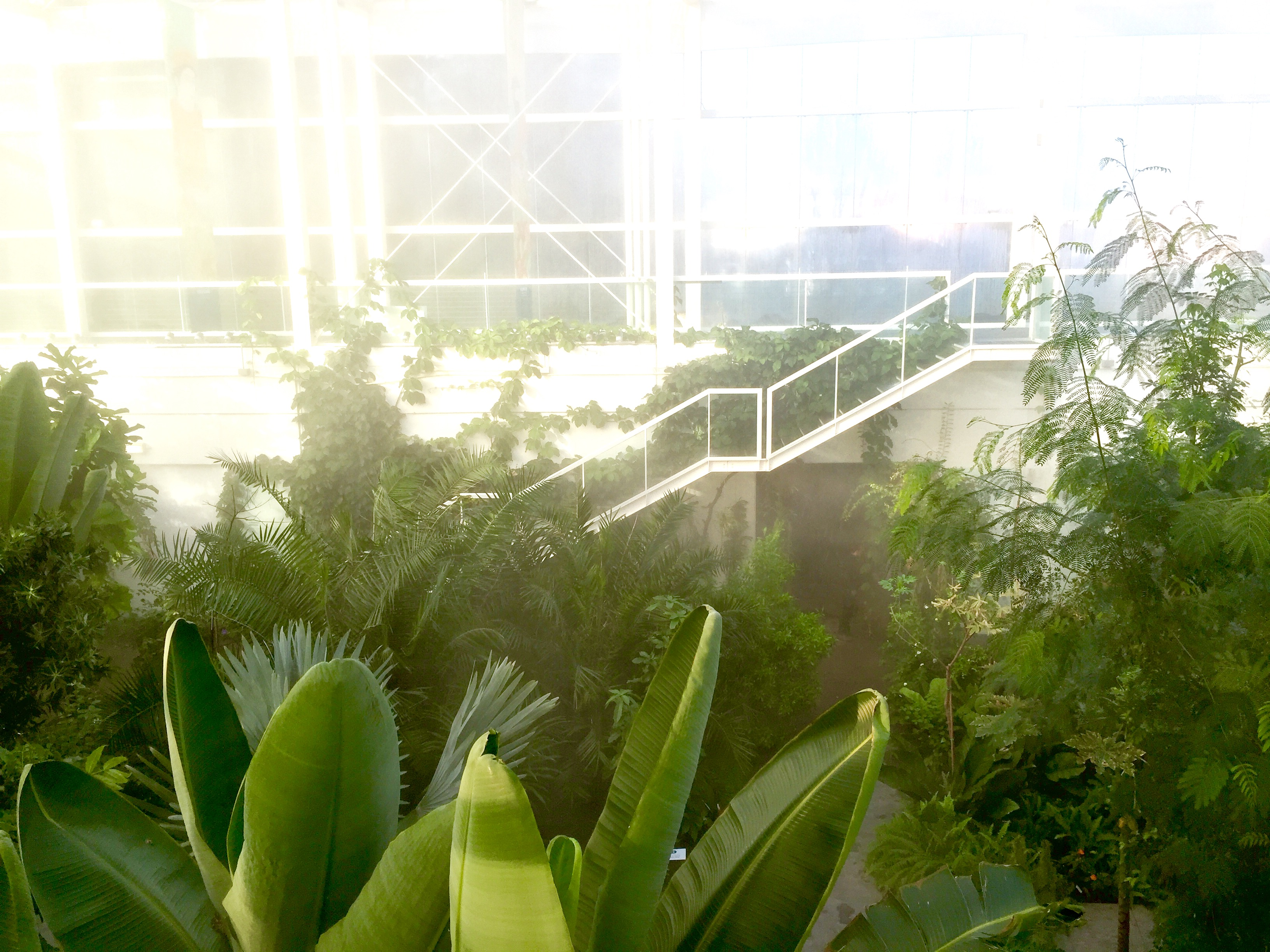 Serra Tropicale del Giardino della Biodiversità, Università degli Studi di Padova